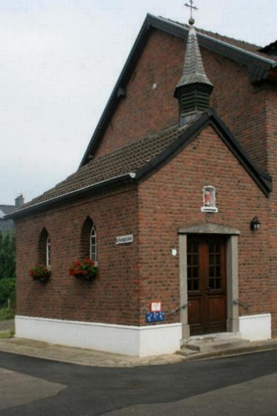 Kapelle in Wegberg-Isengraben